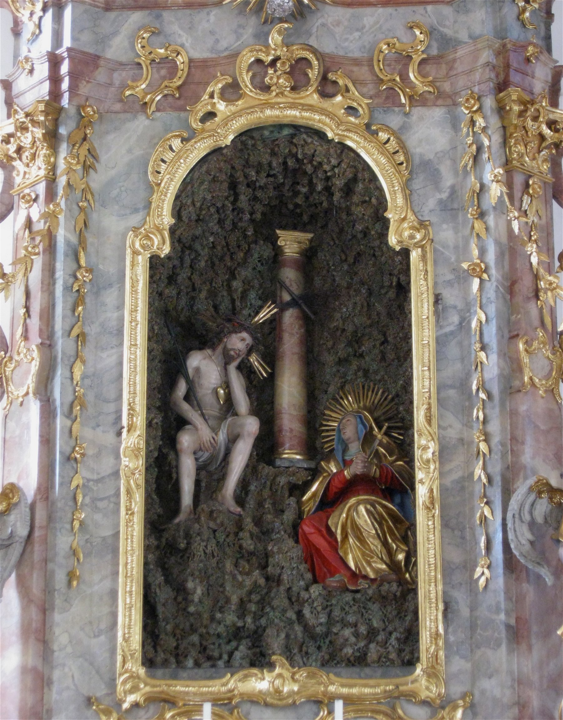 Dietramszell, Maria Elend, Altarbild